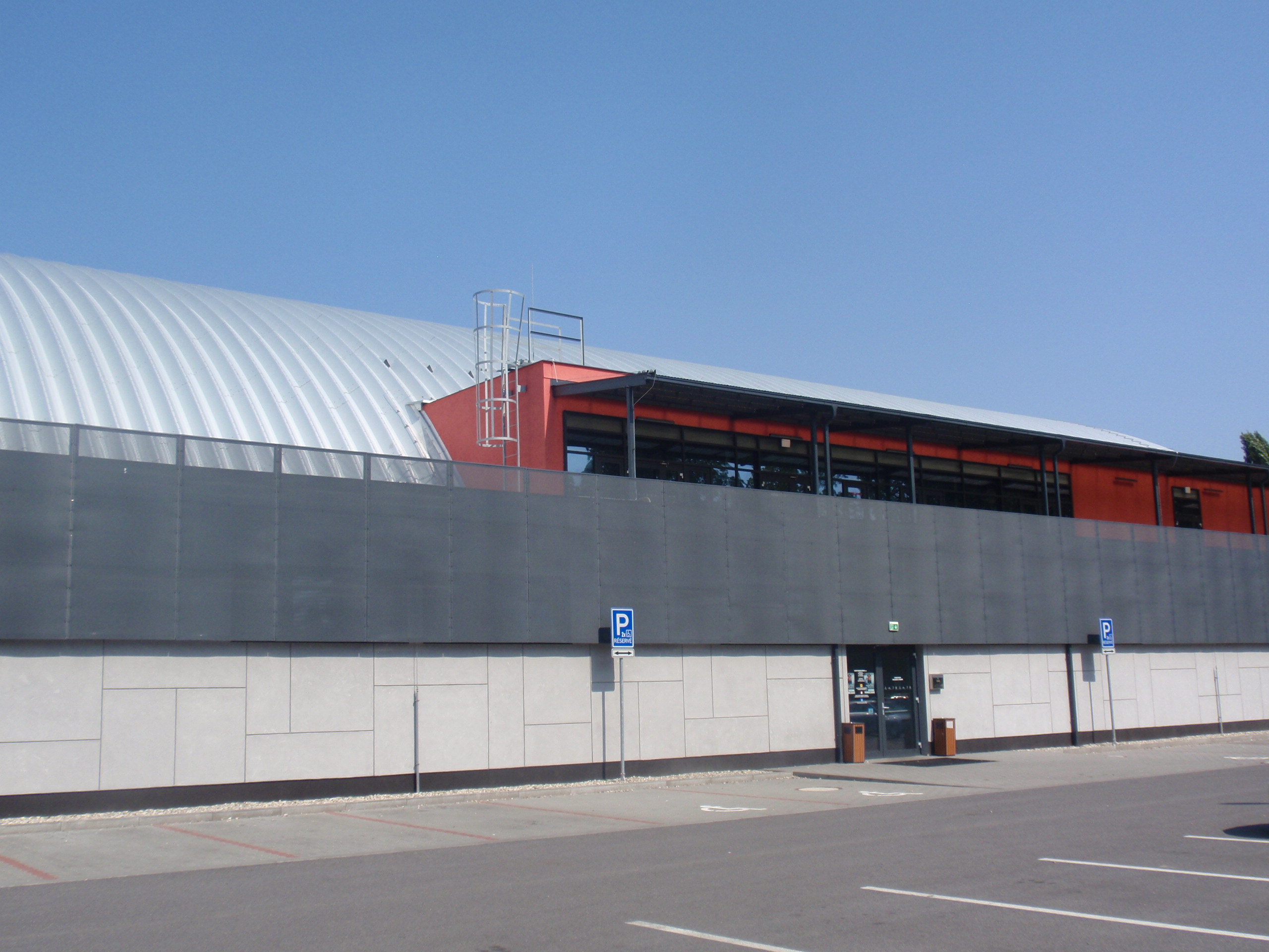 Zimní stadion v Dědicích, mezi dědickým a vyškovským parkem. Demolice starého zimního stadionu ze 70. let 20. století byla zahájena na začátku roku 2017 (koncem února z něj zbyly už jen hromady suti). Během roku byl postaven nový zimní stadion, který si v listopadu 2017 nejprve mohli vyzkoušet sportovci (bylo vydáno povolení k předčasnému užívání stavby), a v prosinci veřejnost. Kolaudace sportovního zařízení proběhla v lednu 2018. Stadion byl pak koncem měsíce otevřen.